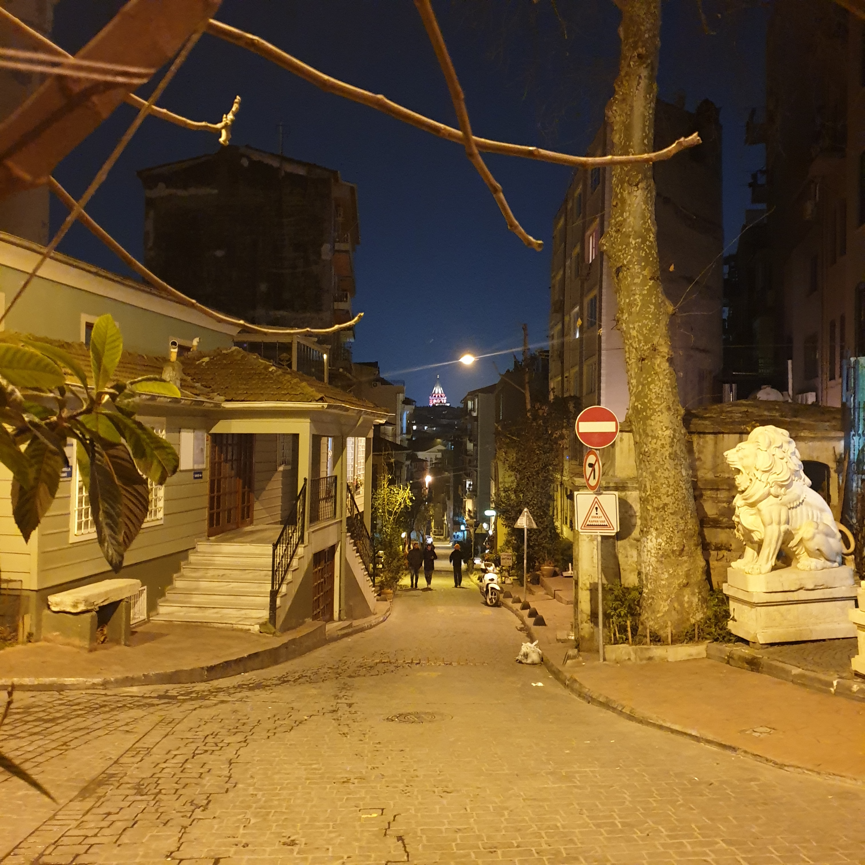 Çukurcuma